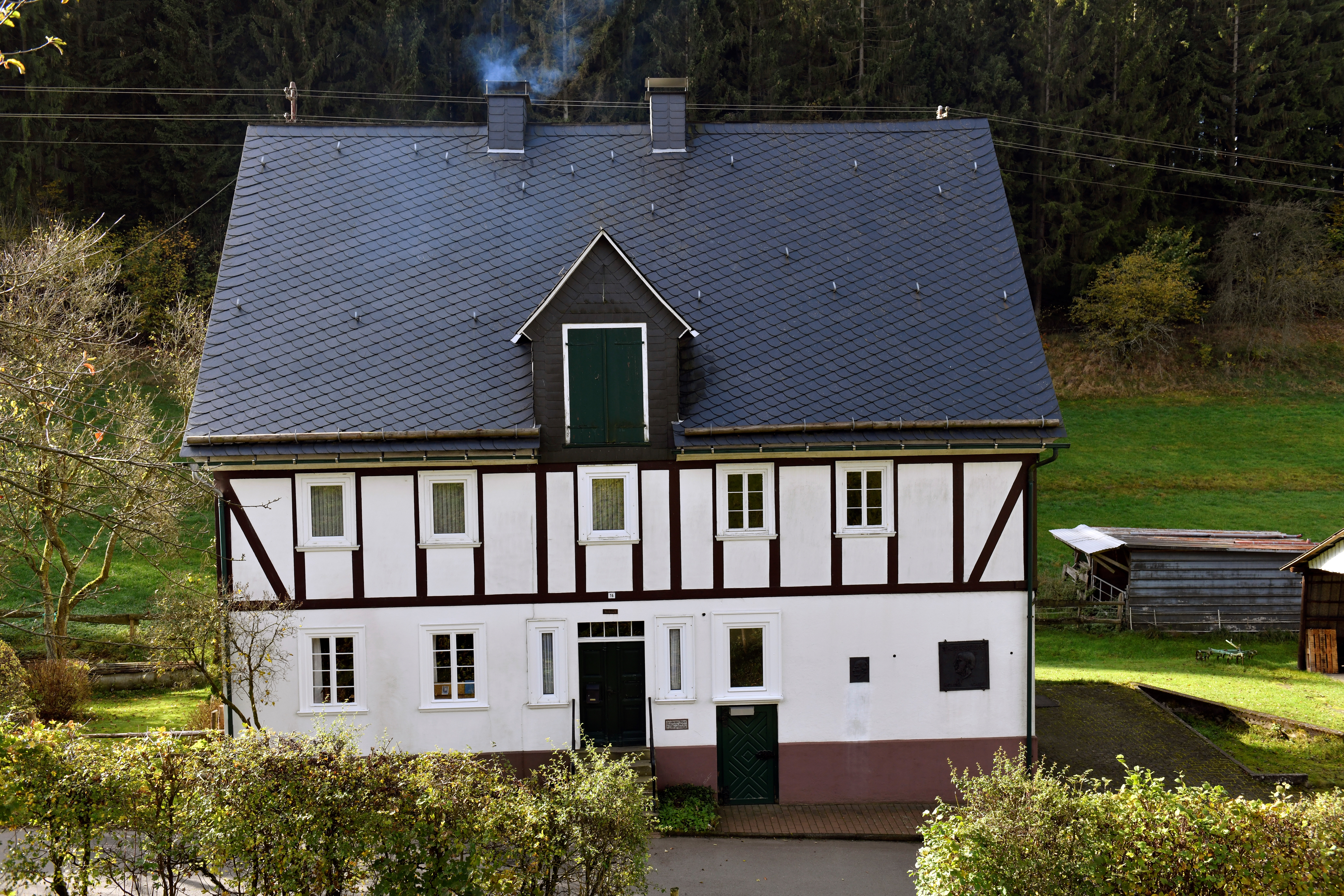 Haus des Ebert Jung von 1730 in Grund bei Hilchenbach, nach Brandschaden restauriert